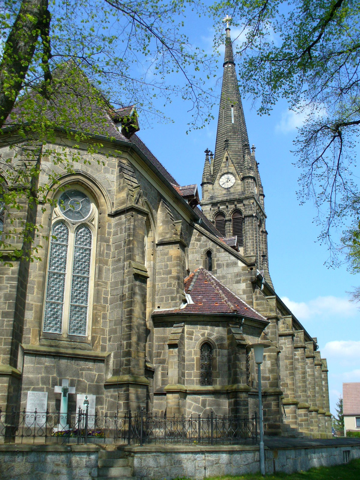 Katholische Herz-Jesu-Kirche zu Storcha. Neugotisch, Grundsteinlegung 1882, Weihe am 19. Juni 1887. Länge 37m, Breite 15m, Turmhöhe 45m. Süd-Ostseite